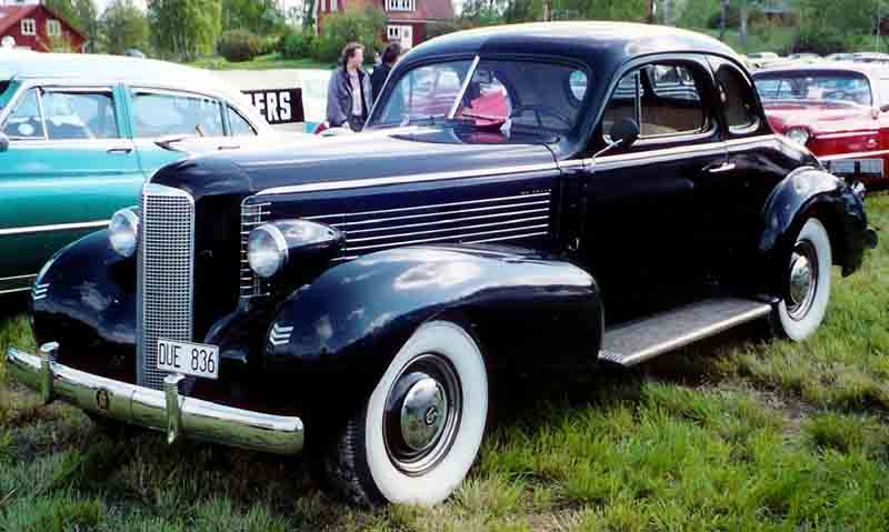 La Salle Series 38-5027 Coupé 1938